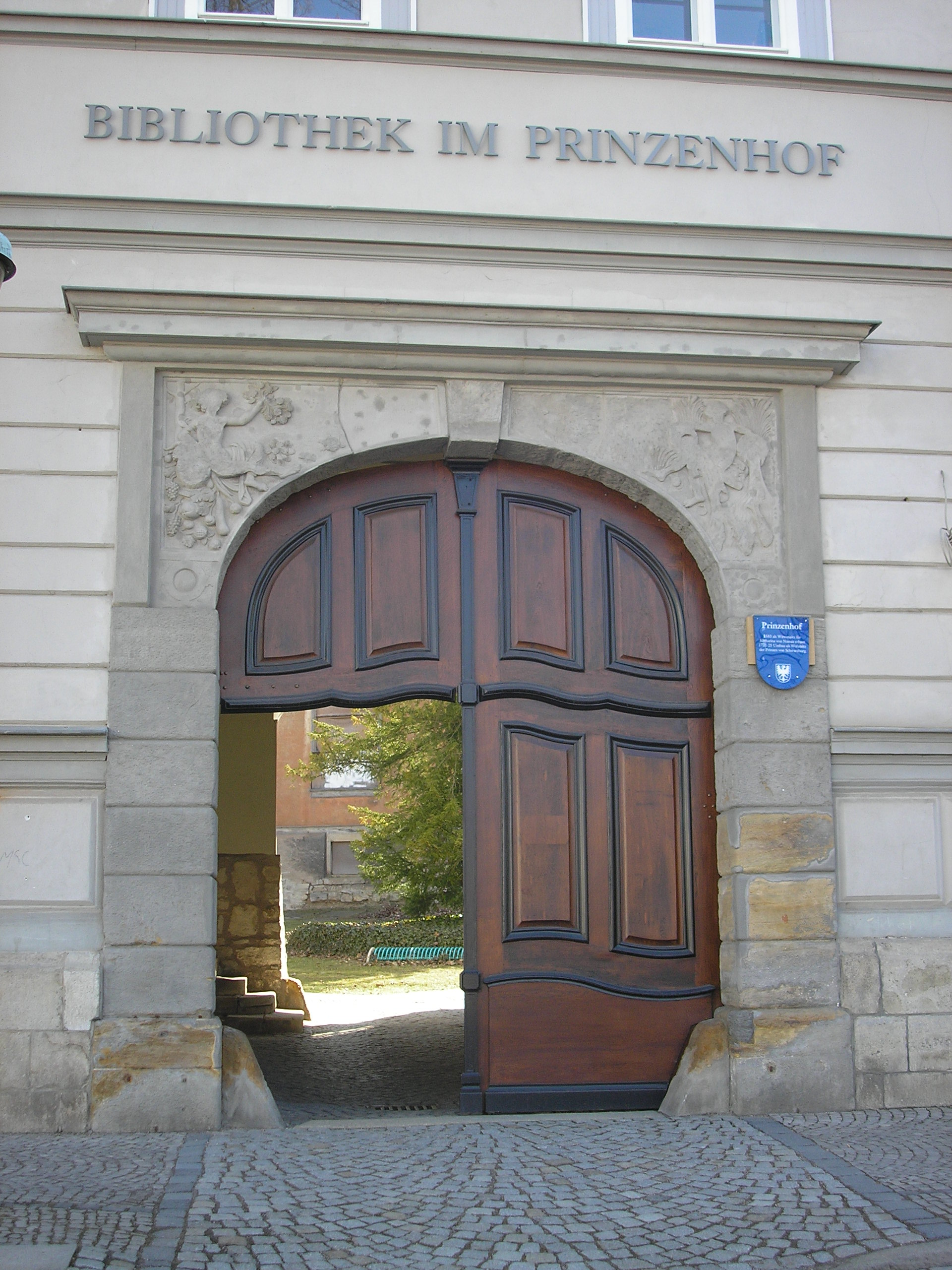 Das Portal des Prinzenhofs in Arnstadt (Thüringen).